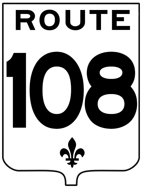 Signalisation de l'ancienne route québécoise 108